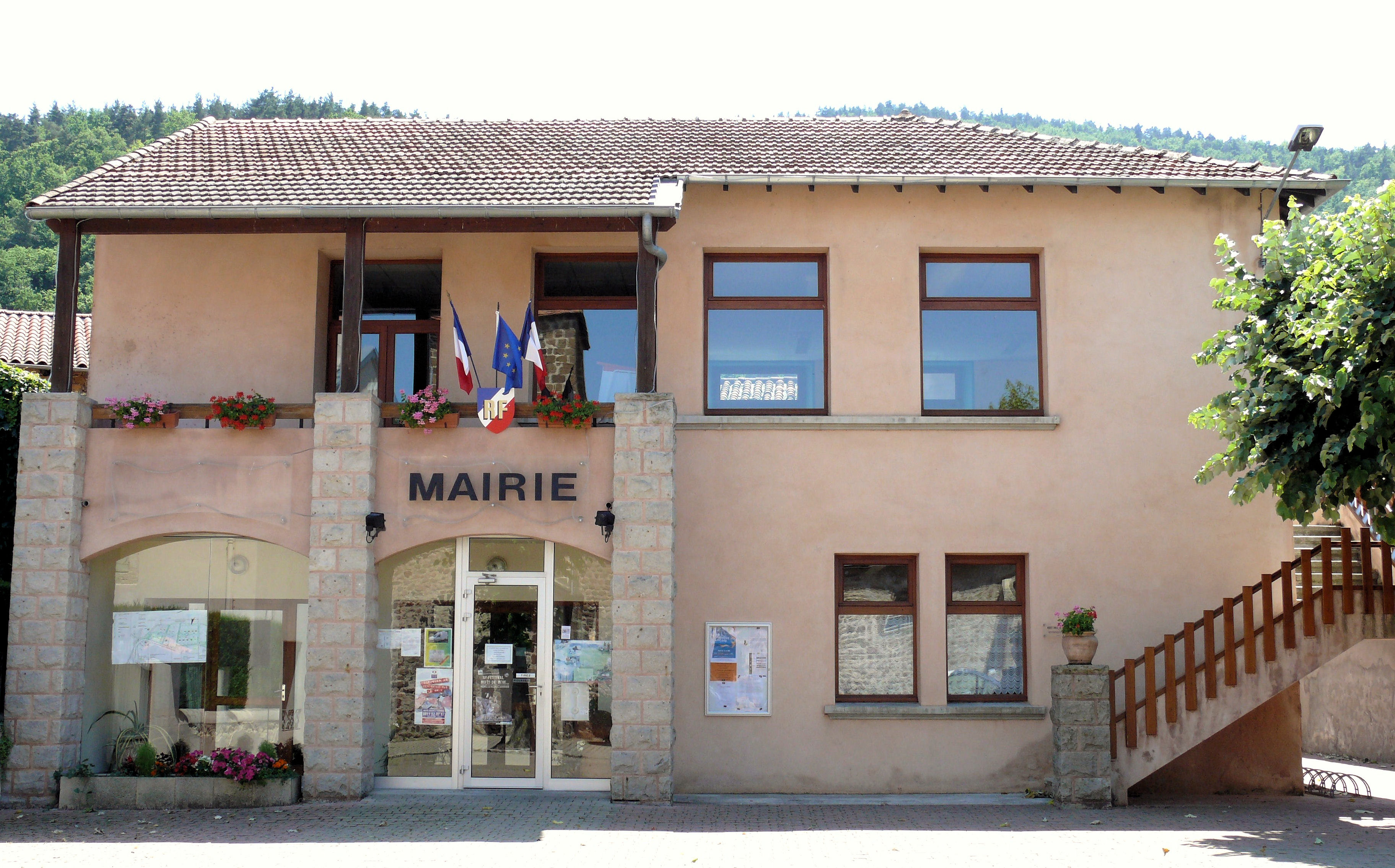 Lavoûte-sur-Loire - Mairie